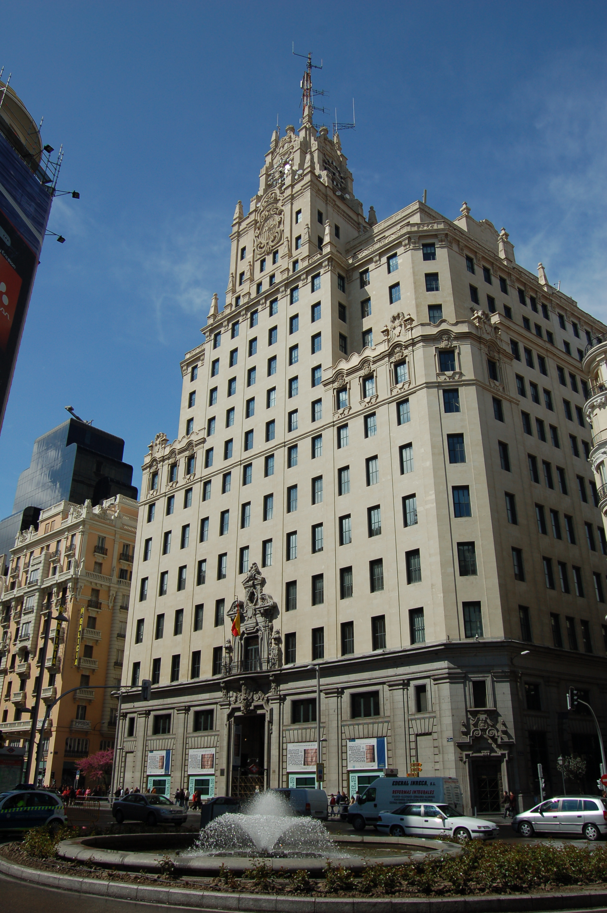 Edificio de Telefónica. Madrid